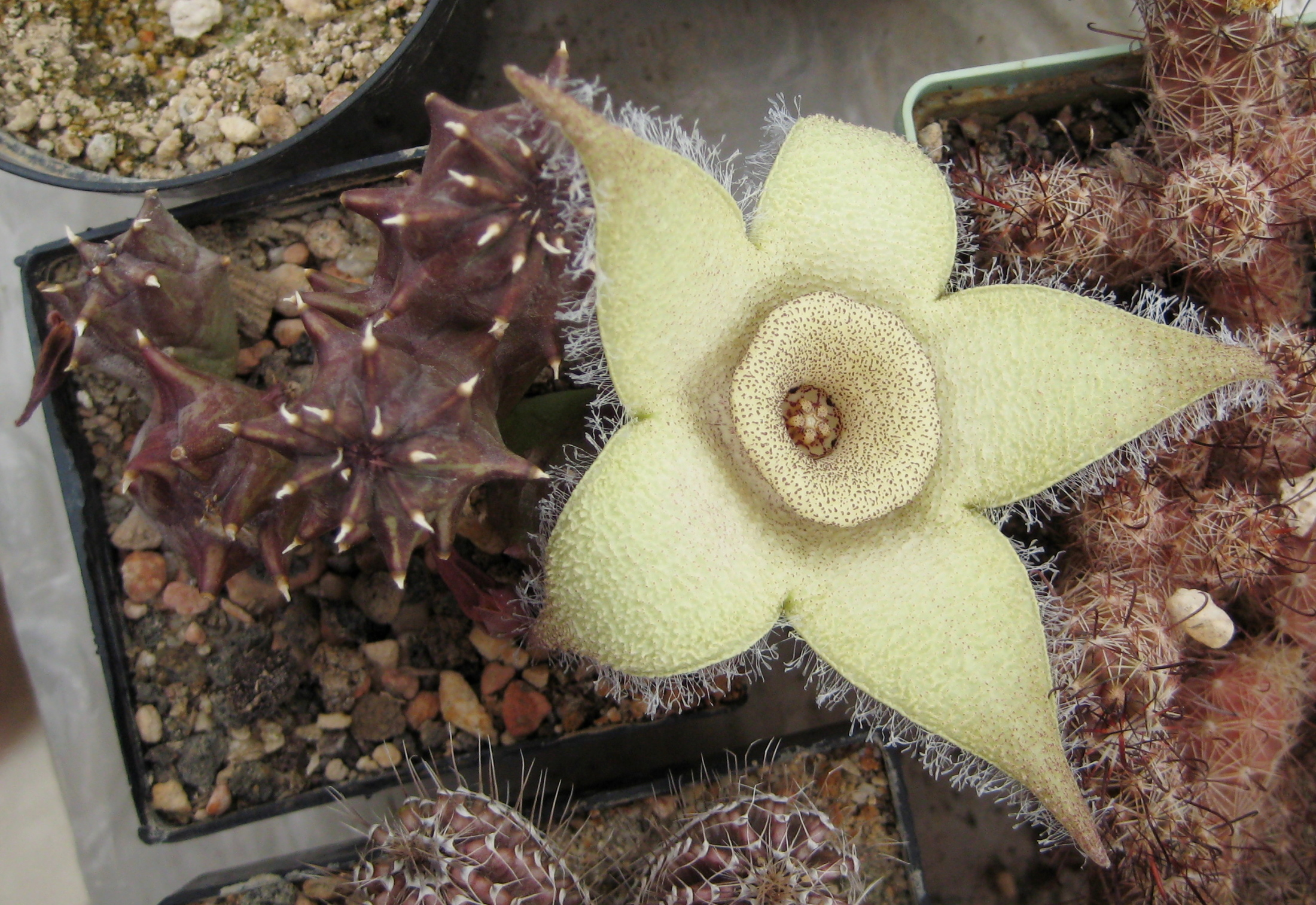 Orbea ciliata in Kultur